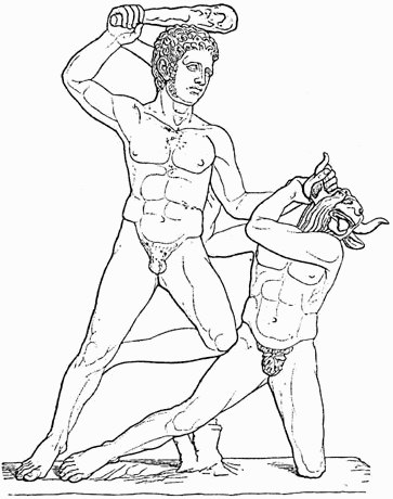 Theseus und Minotauros - Rom, Villa Albani - aus Meyers Konversationslexikon von 1888 - Public Domain